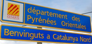 Benvinguts a Catalunya Nord